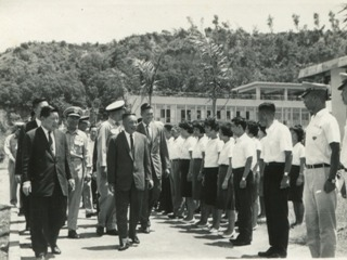 1970年代蔣緯國訪視彰師大